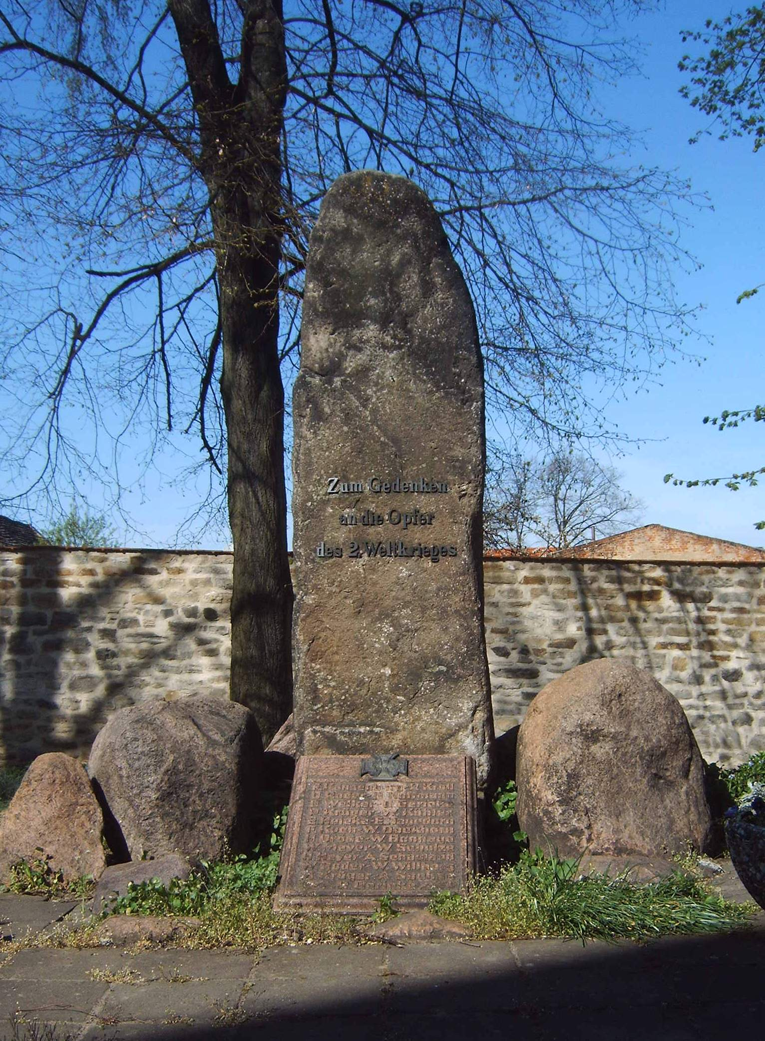 Kriegerdenkmal an der Petrikirche in Beyendorf